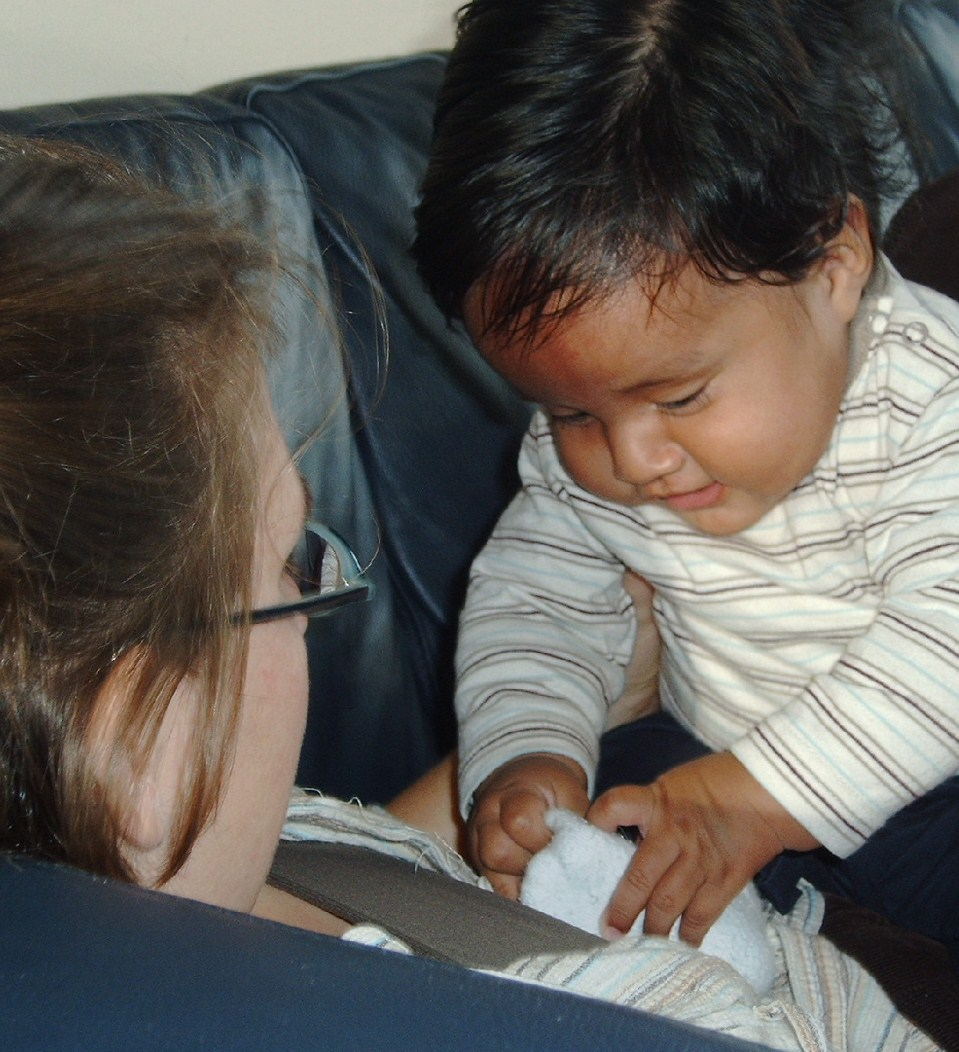 Interracial adoption